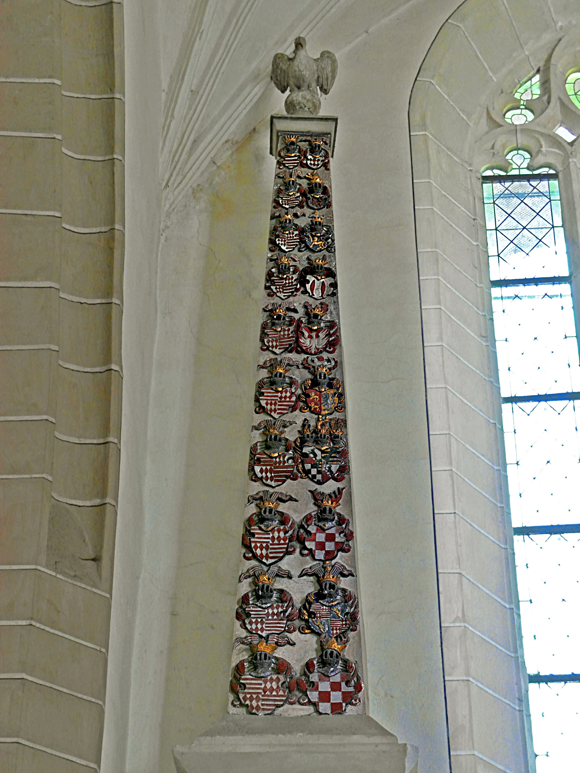 Obelisk mit dem Stammbaum der Grafen zu Mansfeld aus der Zeit von 1229–1567 in der Annenkirche (Eisleben)